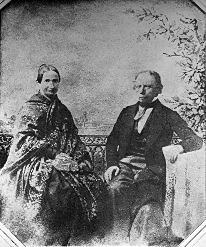 Ludwig und Emilie Uhland (Reproduktion 1941 einer verschollenen Talbotypie)